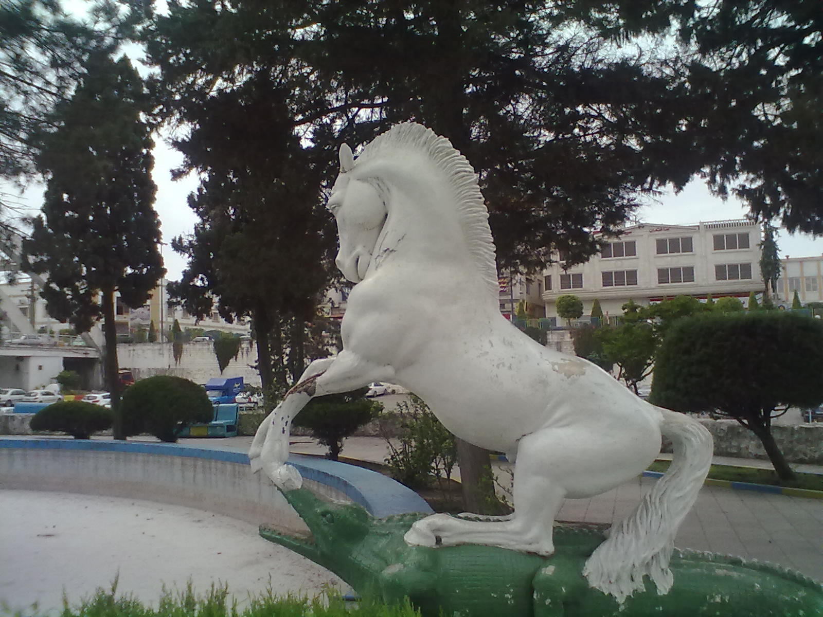 مجسمه اسب و سوسمار در پارک آمل عکس توسط محمدرضارضایی